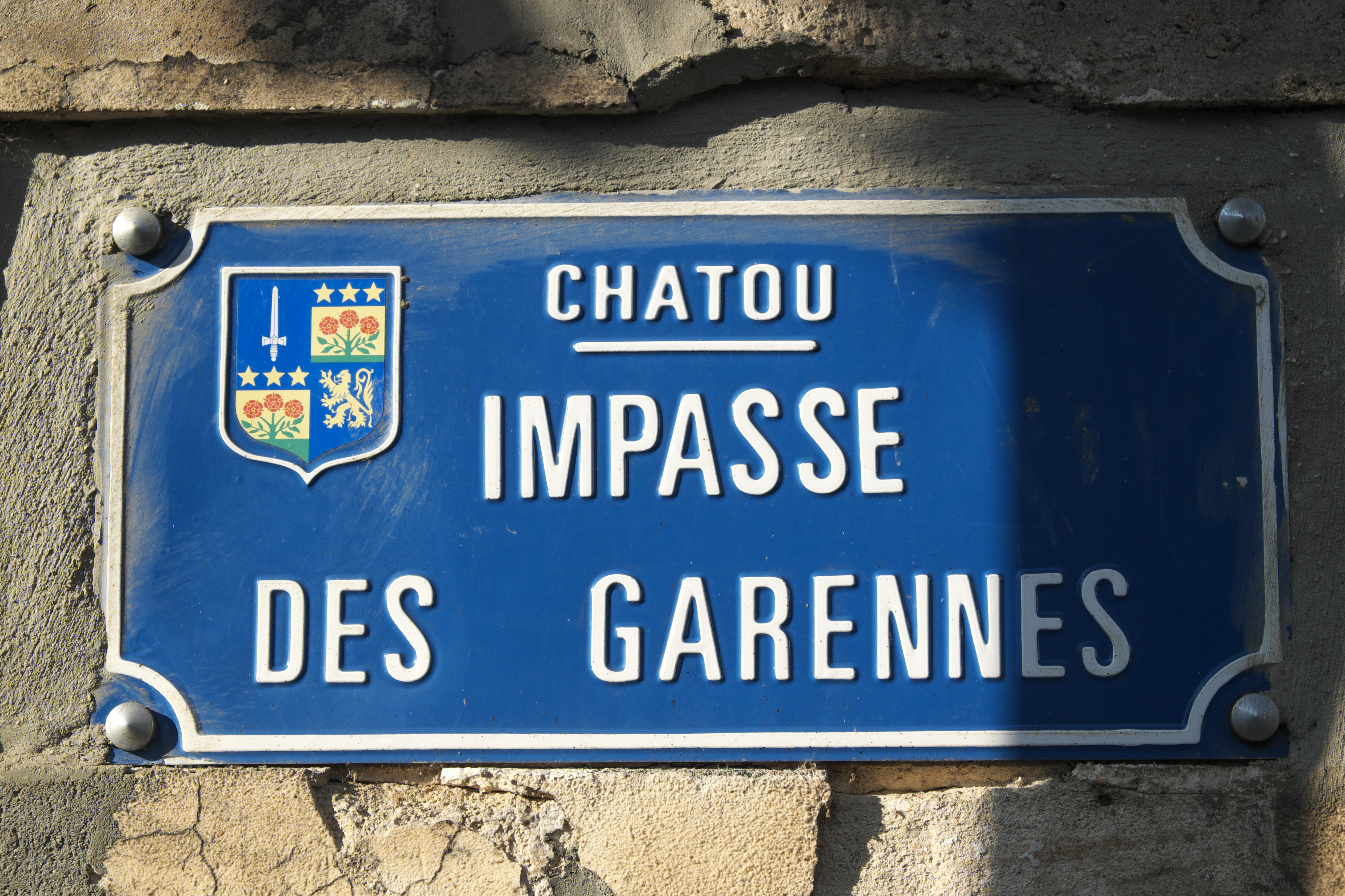 Straßenschild IMPASSE DES GARENNES in Chatou im Département Yvelines (Île-de-France/Frankreich)